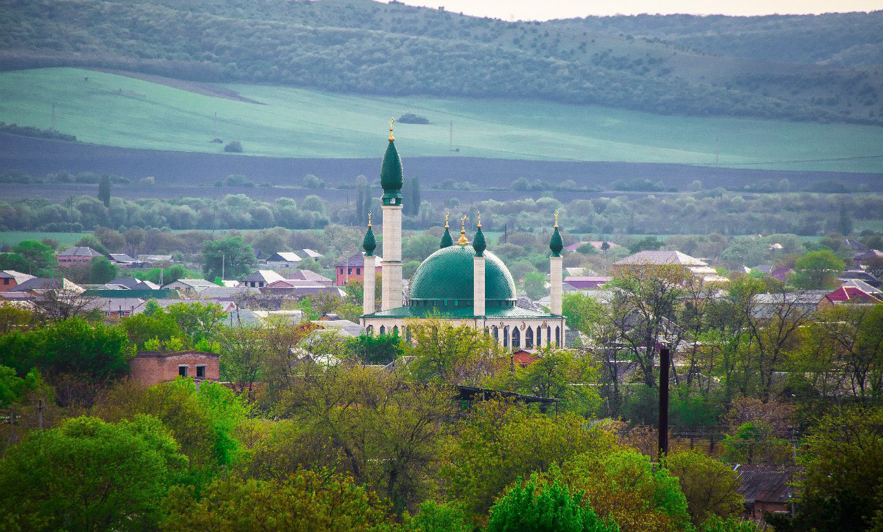 Мечеть в городе Сунже Республики Ингушетия